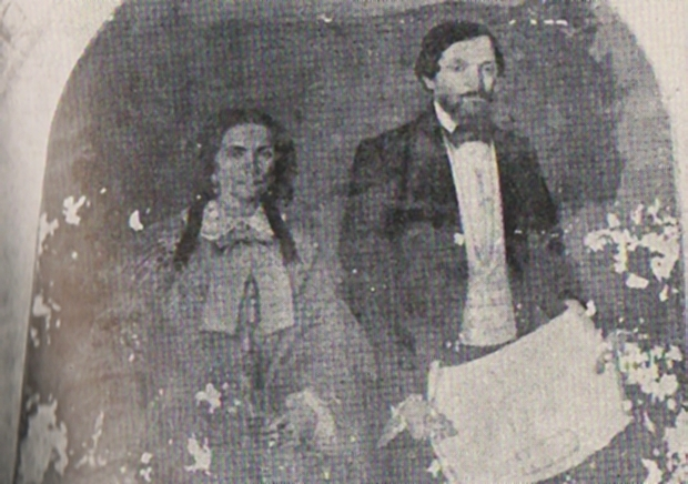 Ctitorii de la Gârbovu, Gorj, foto alb negru din 1956 de autor necunoscut